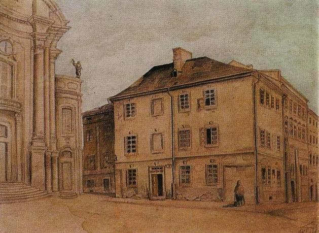 Братська школа: Будівля школи